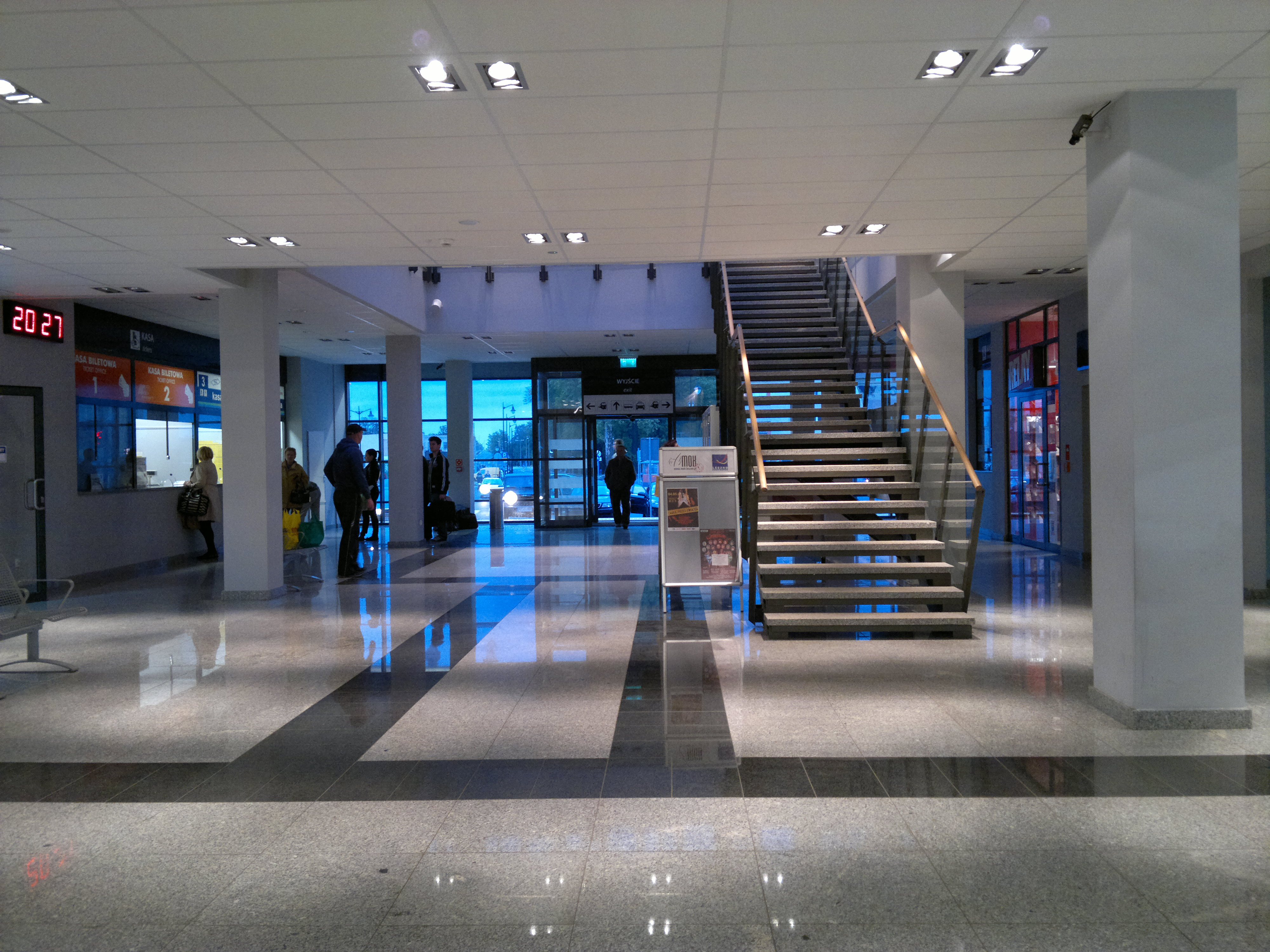 Polska, woj. wielkopolskie, Leszno, Plac przed zmodernizowanym dworcem kolejowym (widok z tarasu budynku)